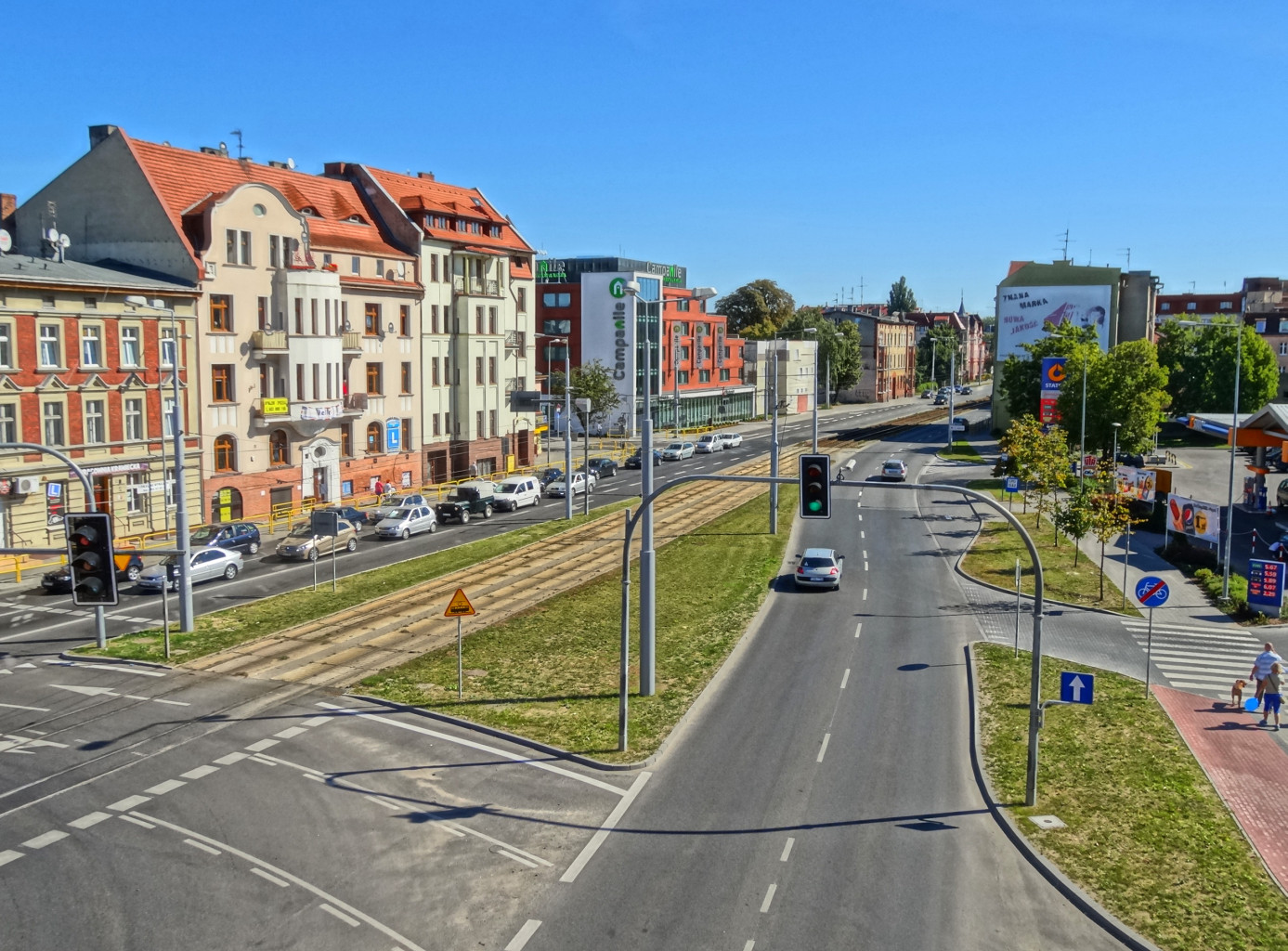 Ulica Jagiellońska w Bydgoszczy - widok z Trasy Uniwersyteckiej